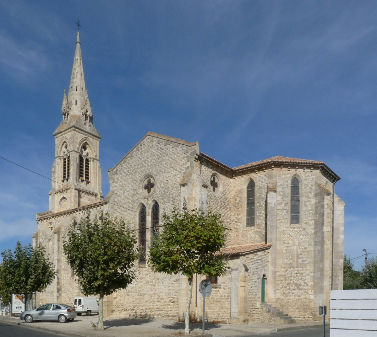 Template:Le Verdon, Gironde, France